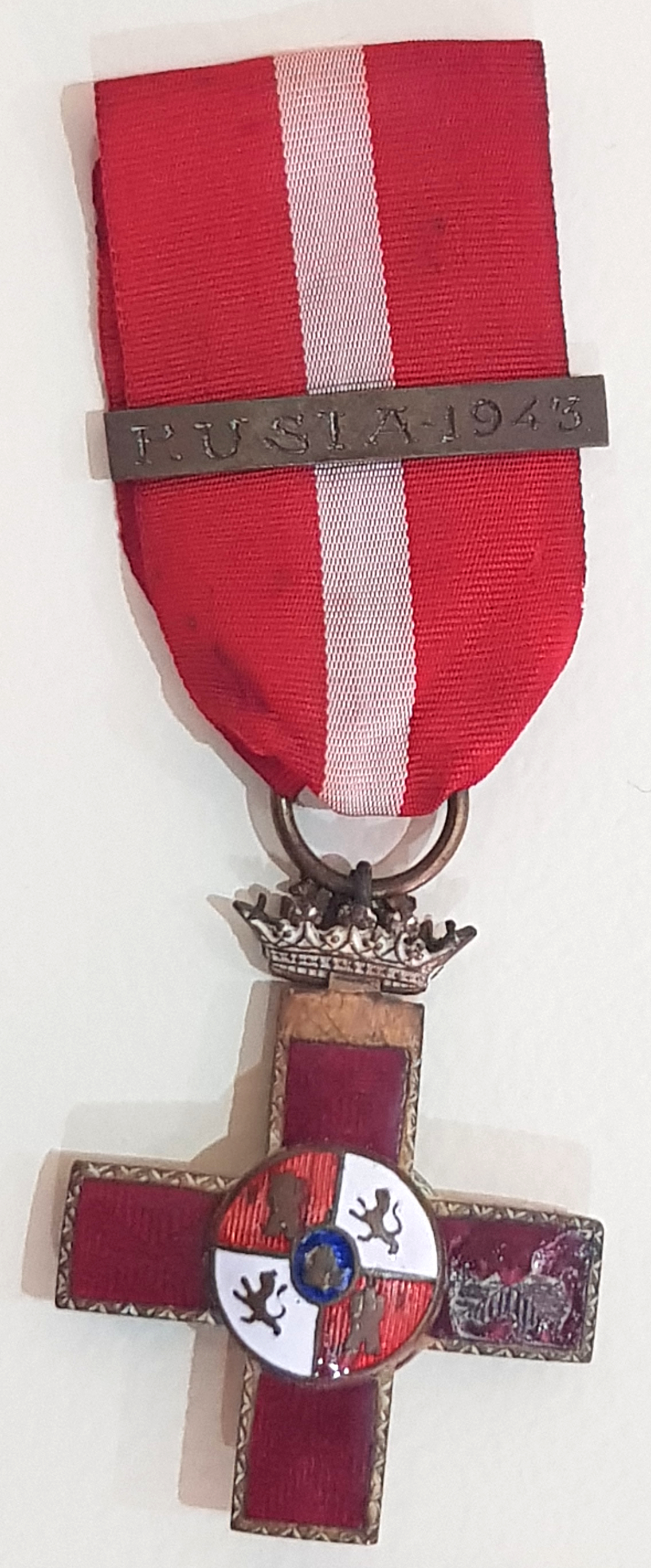 Spanischer Militärverdienstorden (Orden del Mérito Militar) für subalterne Offiziere, Unteroffiziere und Mannschaften des Heeres. Die hier gezeigte Variante Cruz distintivo rojo, hier in der Ausführung 1941, war die oberste Stufe dieser Klasse. Hinzu kommt die Spange zum Einsatz in Rußland 1943.